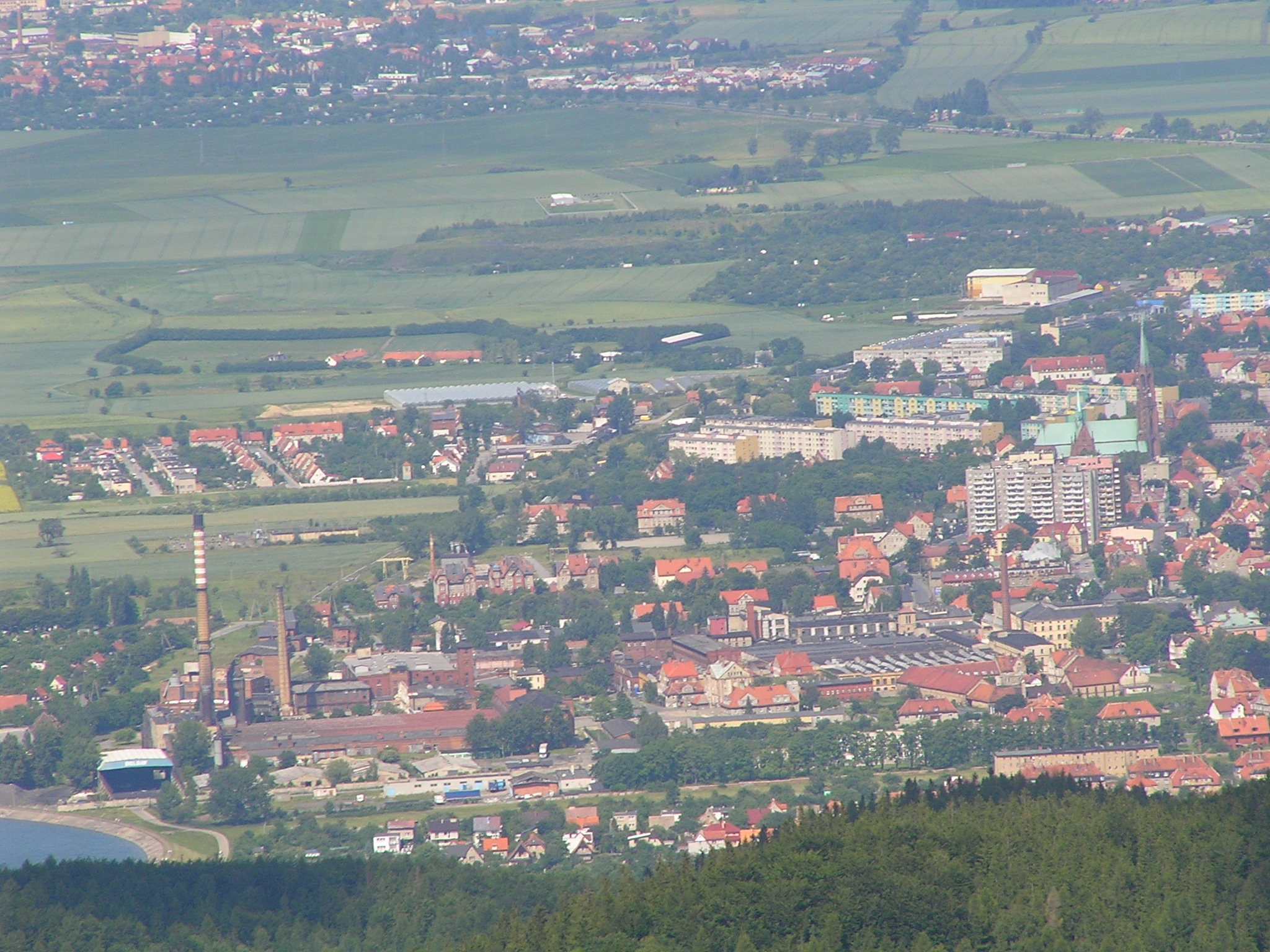 Bielawa z Kalenicy